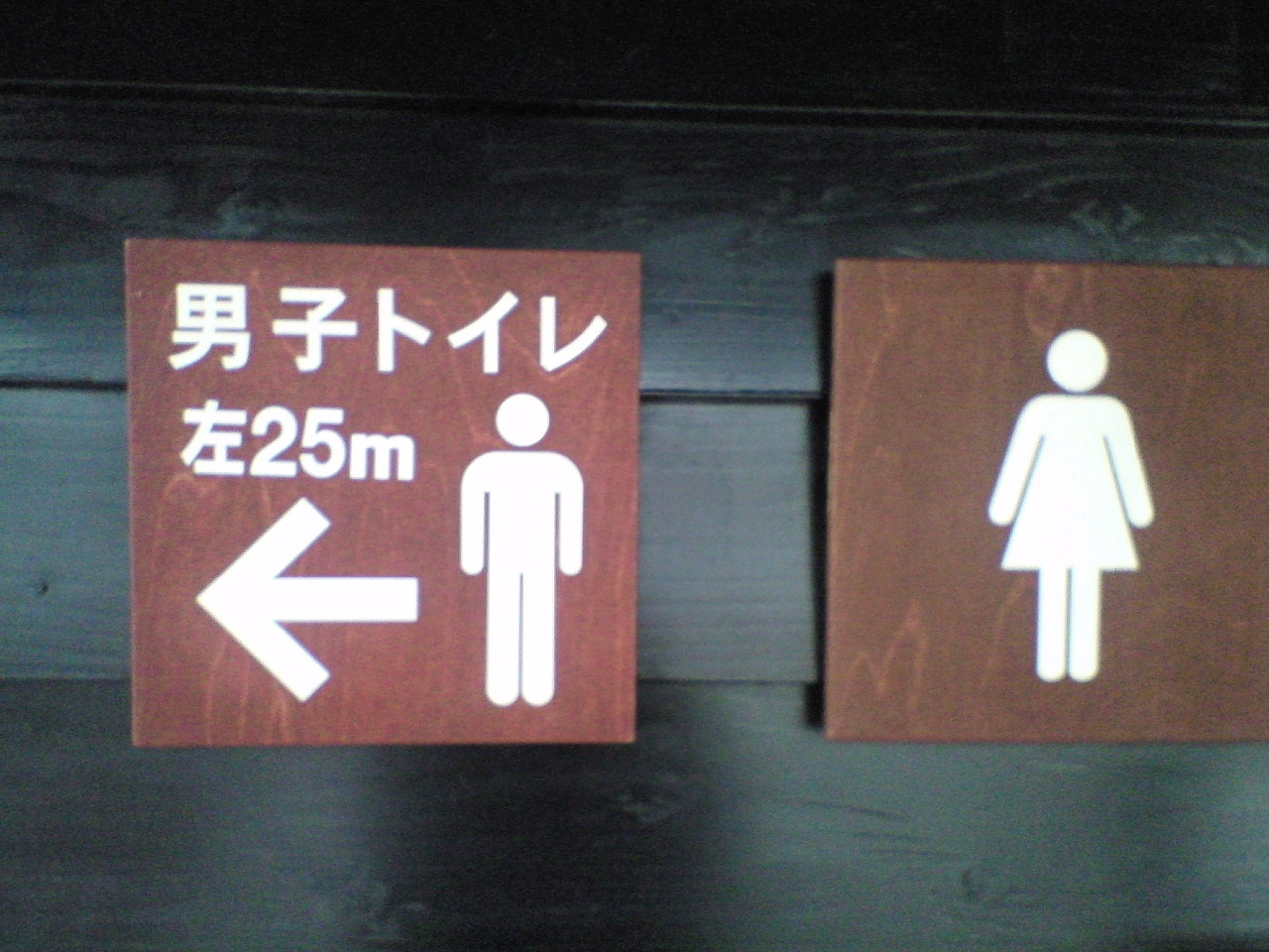 駅舎にある男子トイレへの案内表示